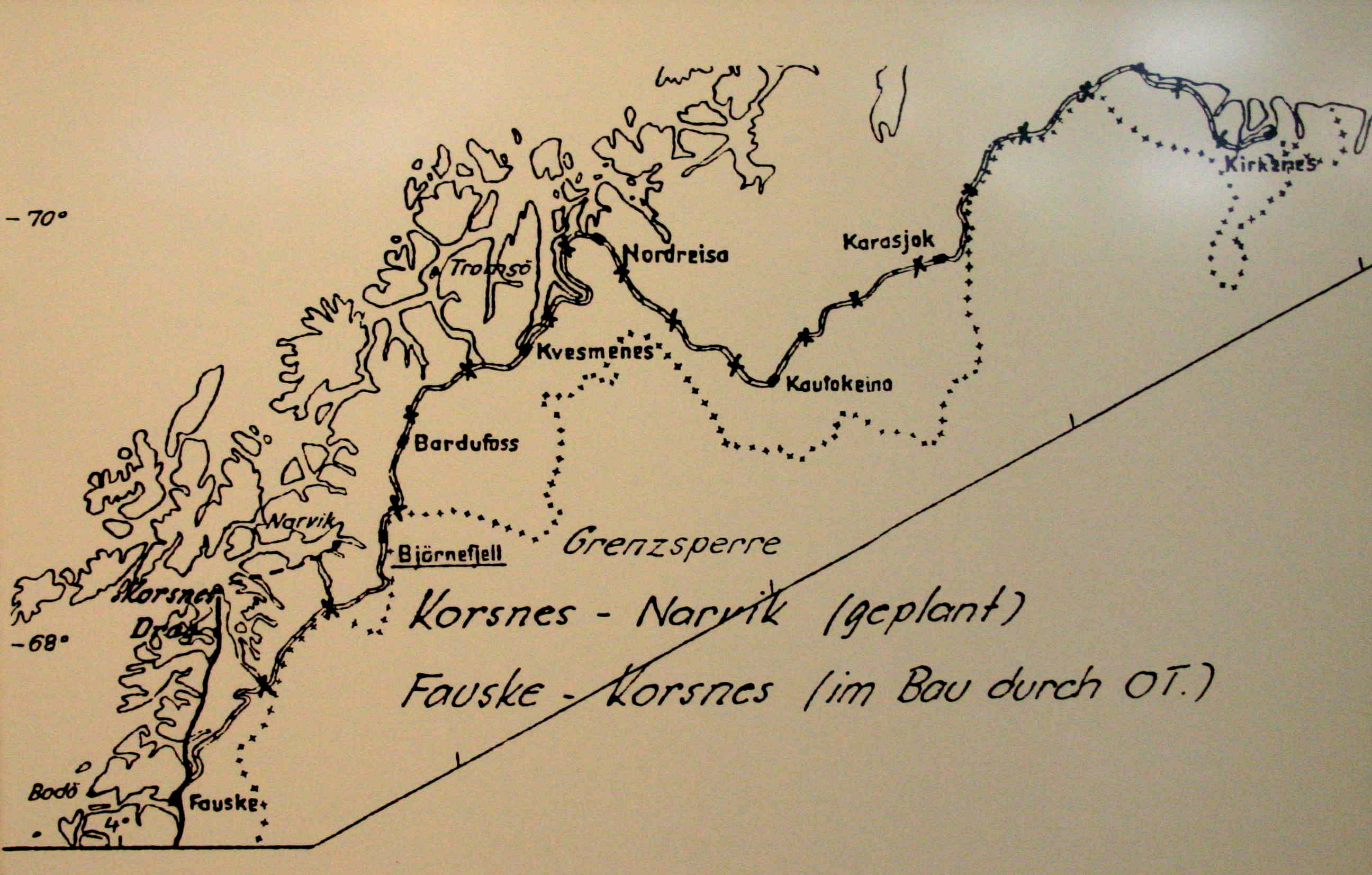 Karte Polarbanan